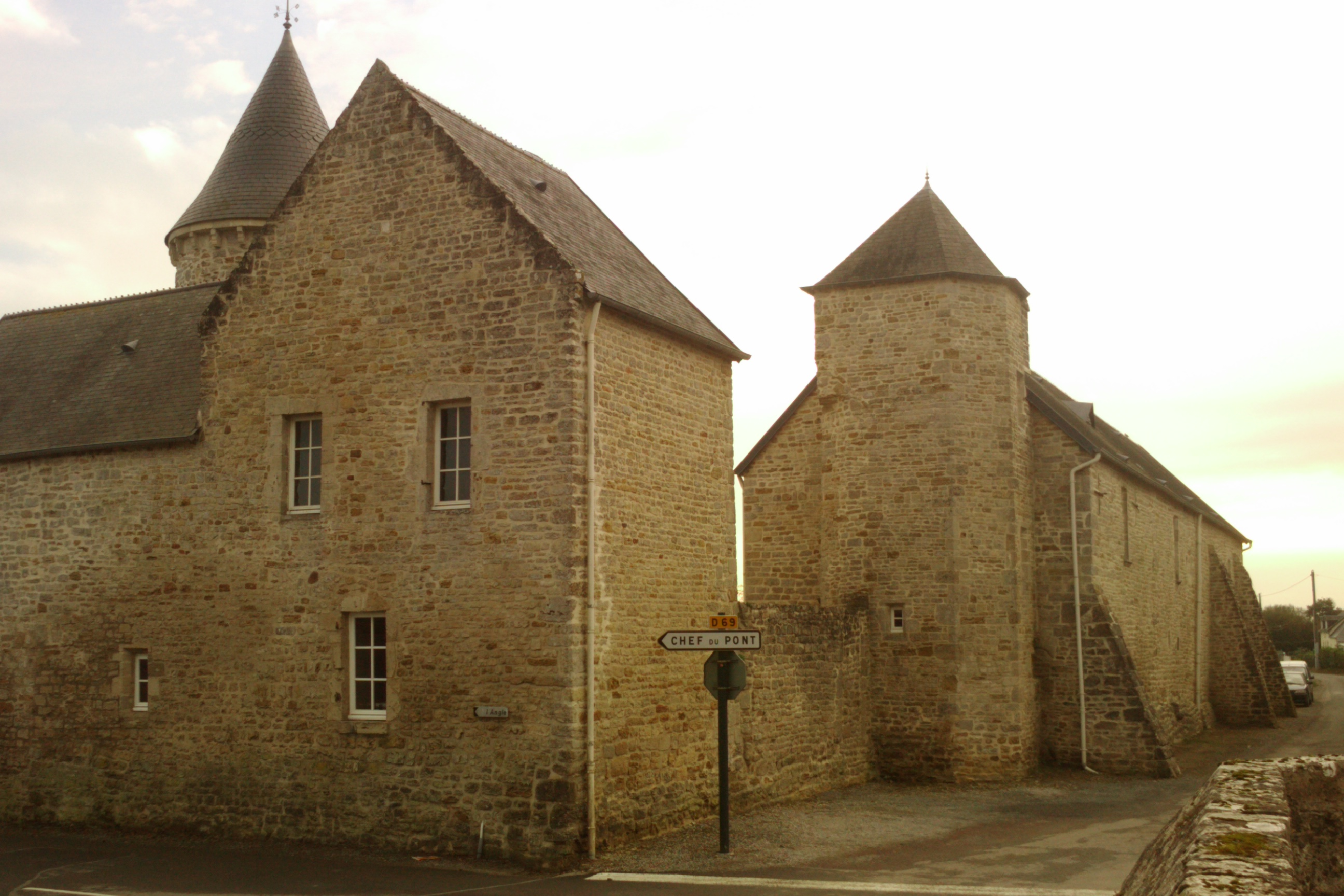 IA00001207 IA00001207 This building is indexed in the Base Mérimée, a database of architectural heritage maintained by the French Ministry of Culture, under the references IA00001207 and IA00001207.